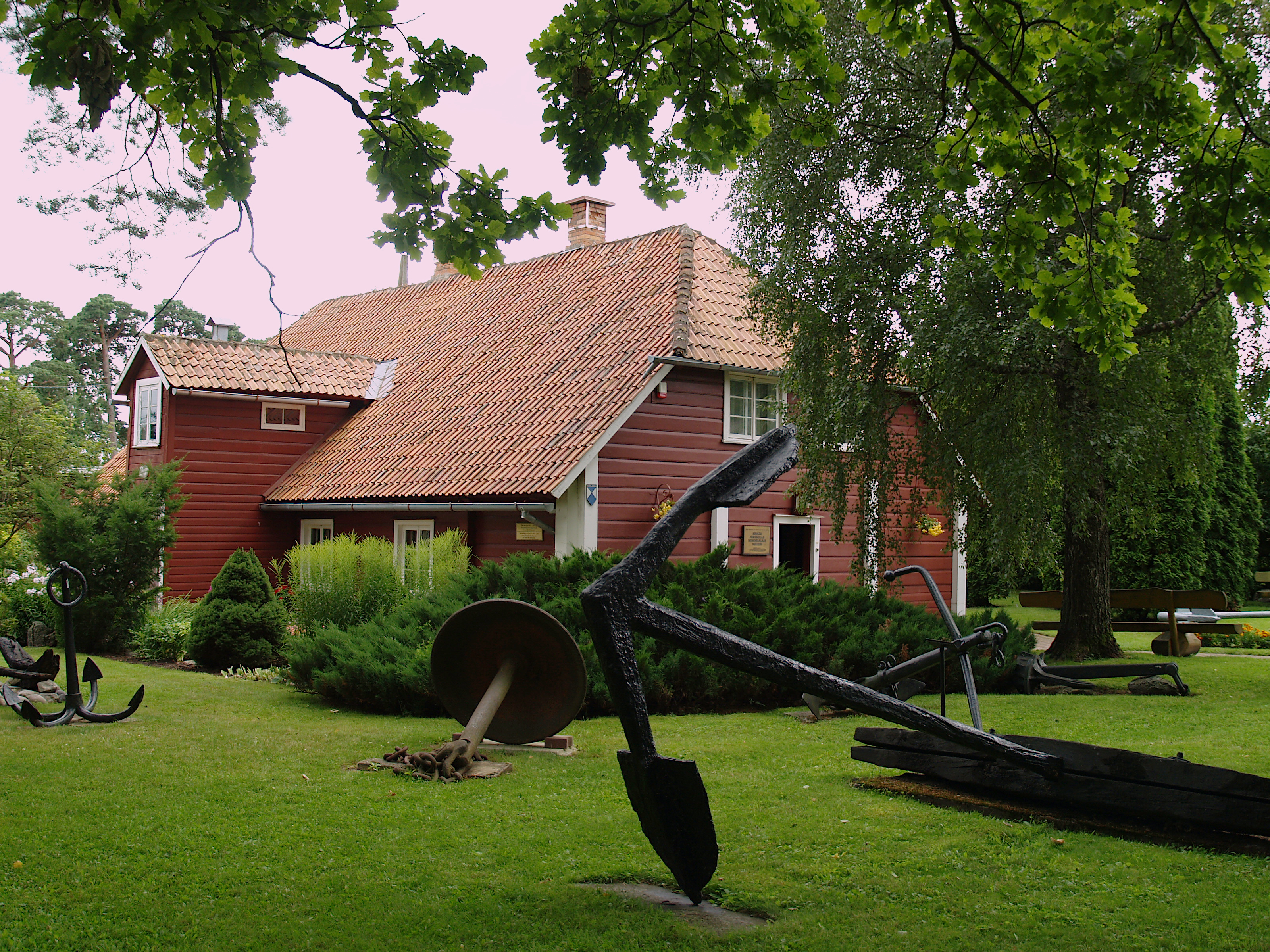 Heinaste merekooli hoone